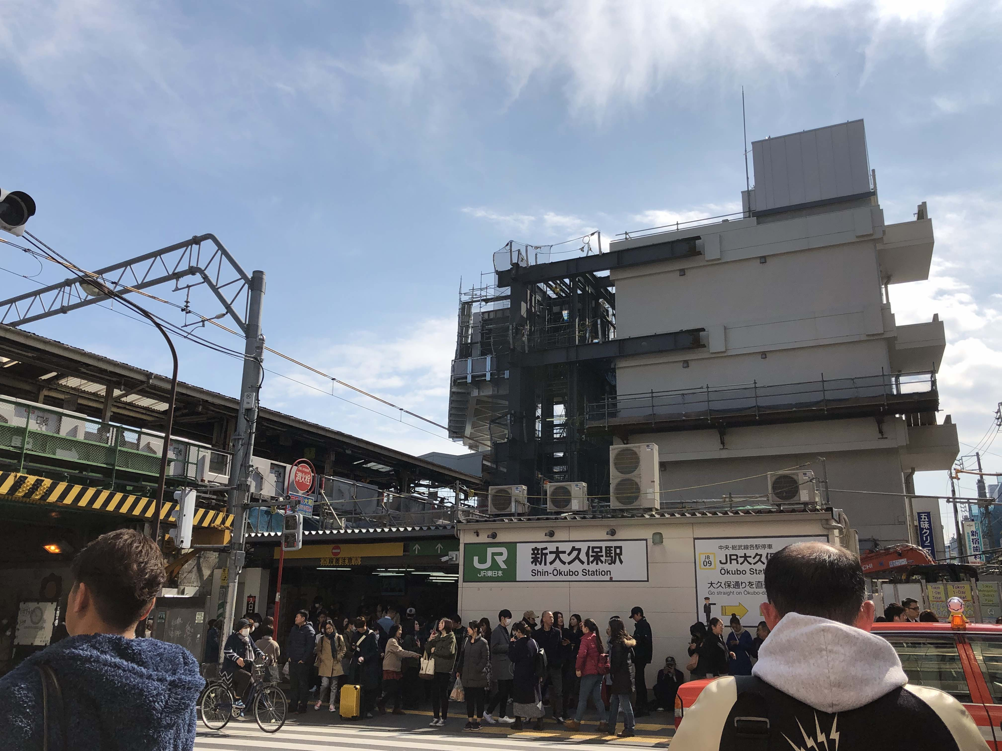 工事中の新大久保駅(2019年3月2日)